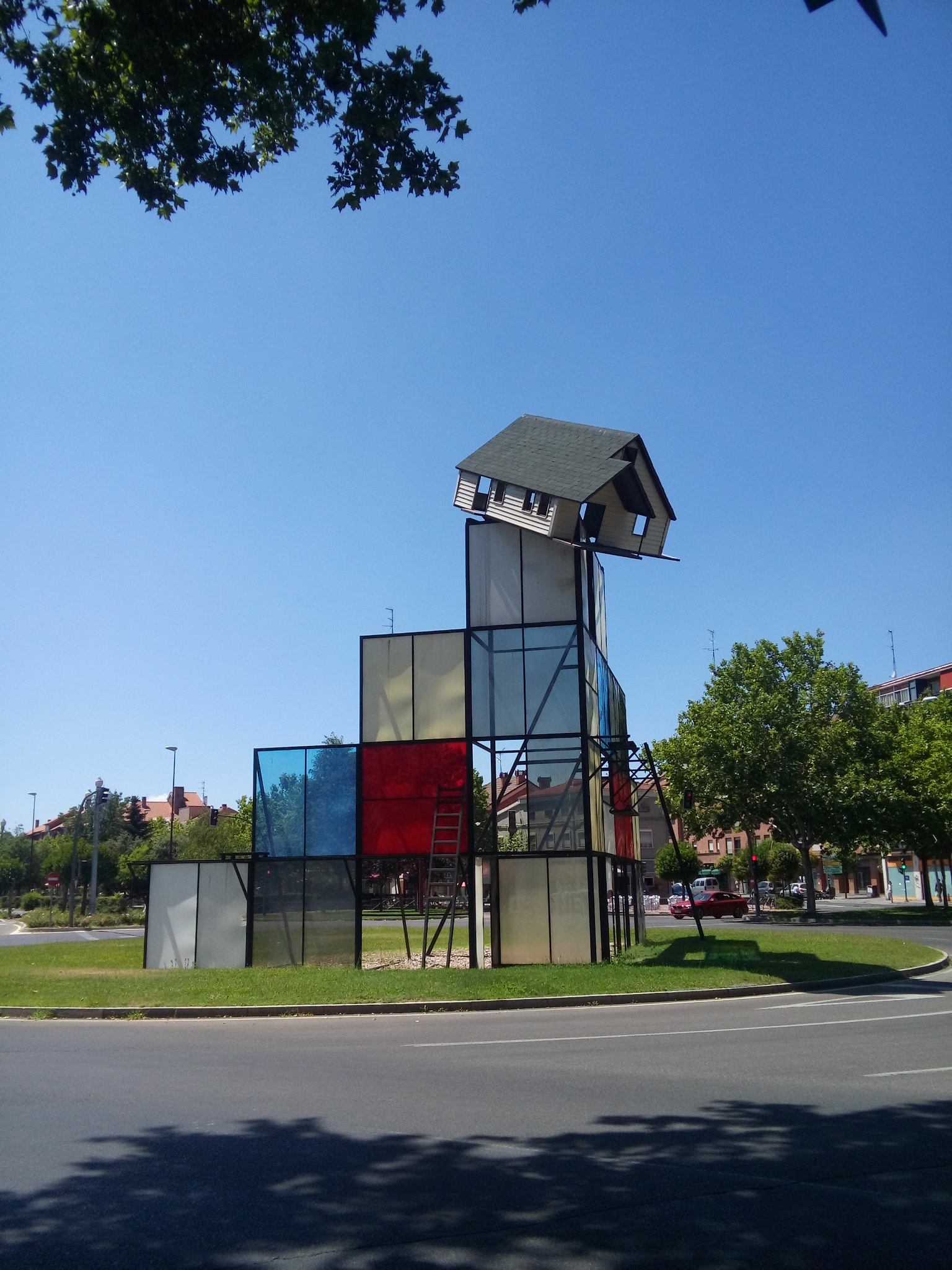 Monumento al Cine (originalmente Escenario para una película) de Dennis Oppenheim situado en la ciudad de Valladolid (España).